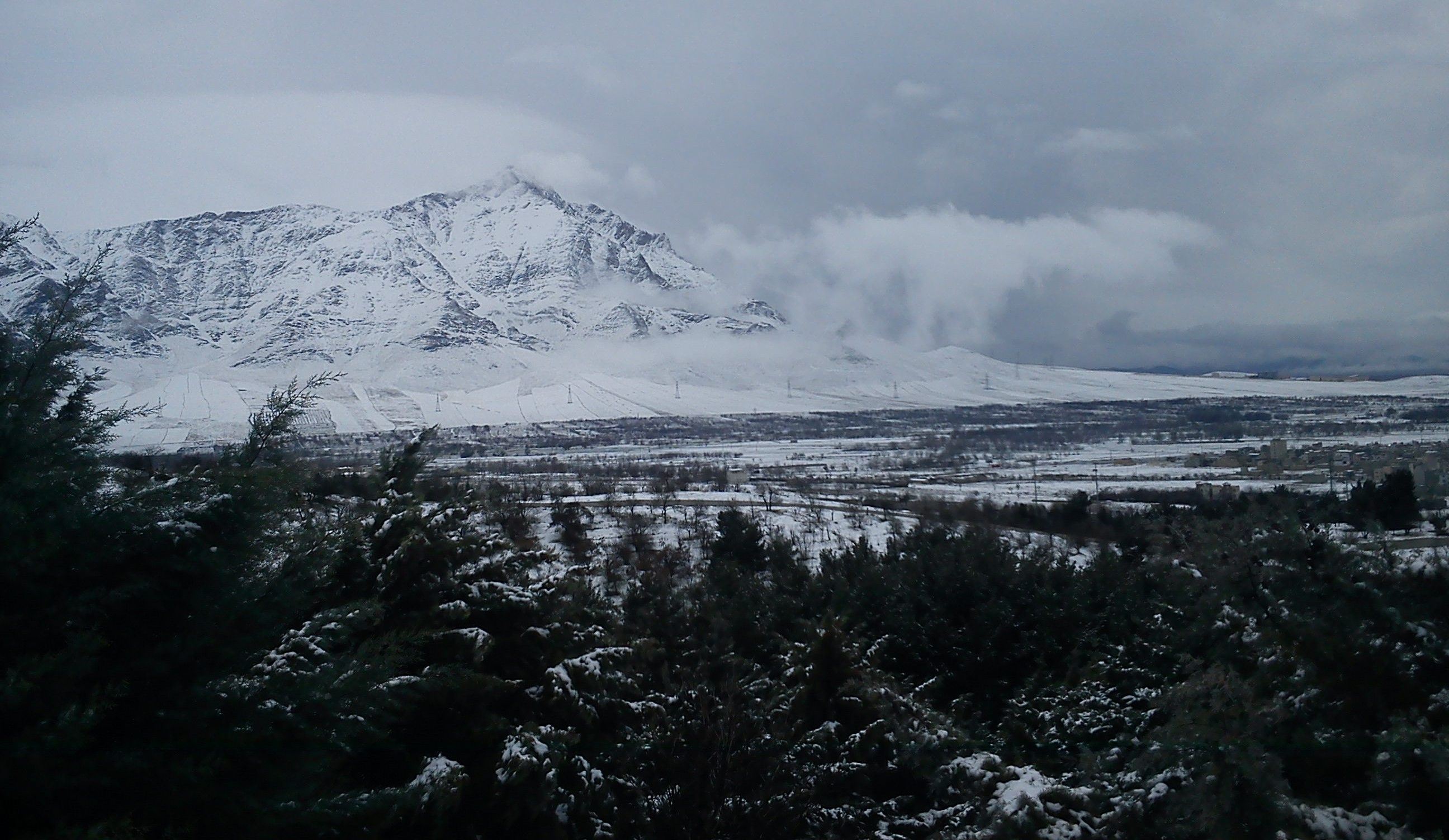 کوه سرده از بام ملایر